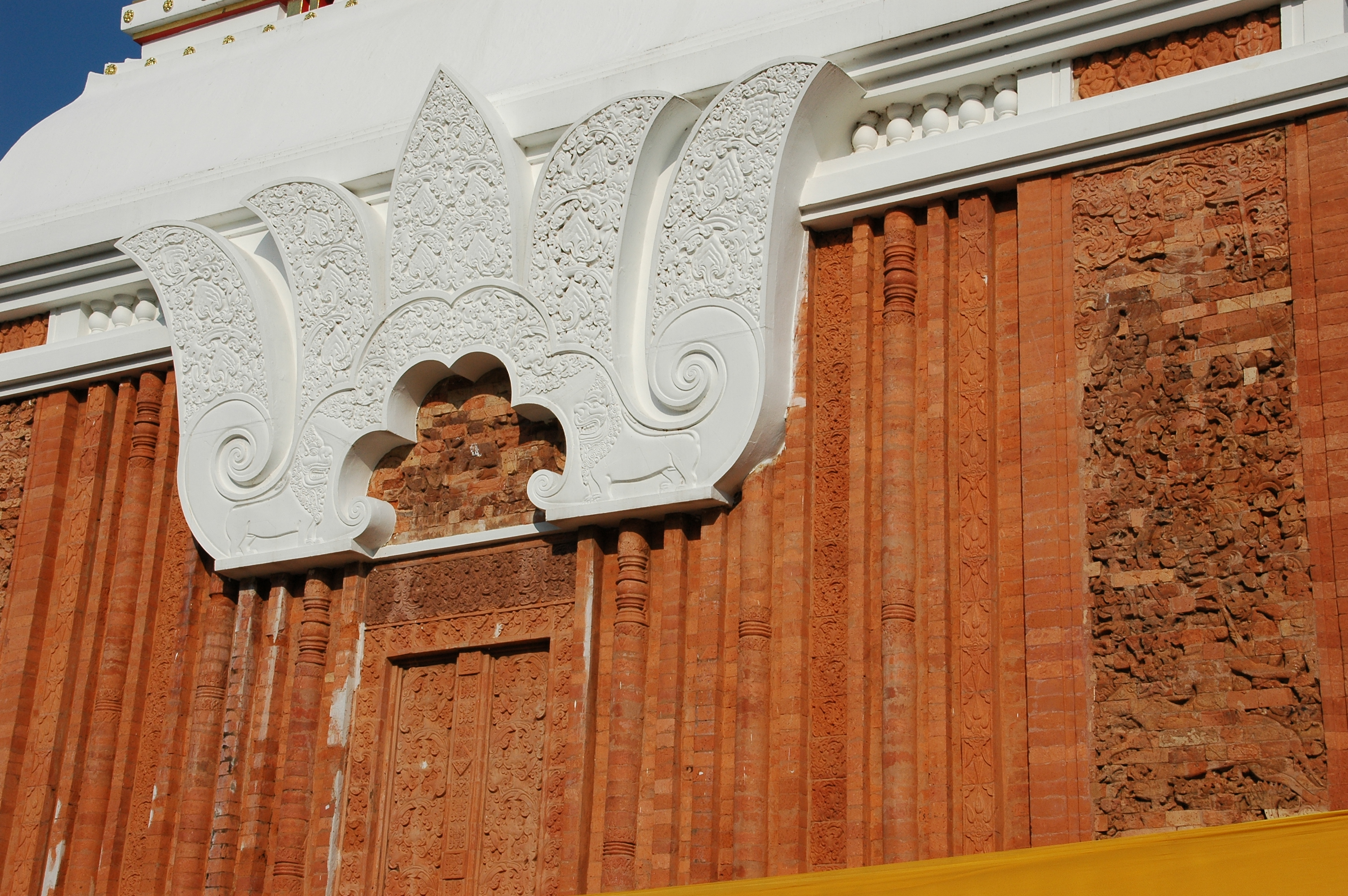 Wat Phra That Phanom, Detail, Nakhon Phanom, Isaan, Thailand